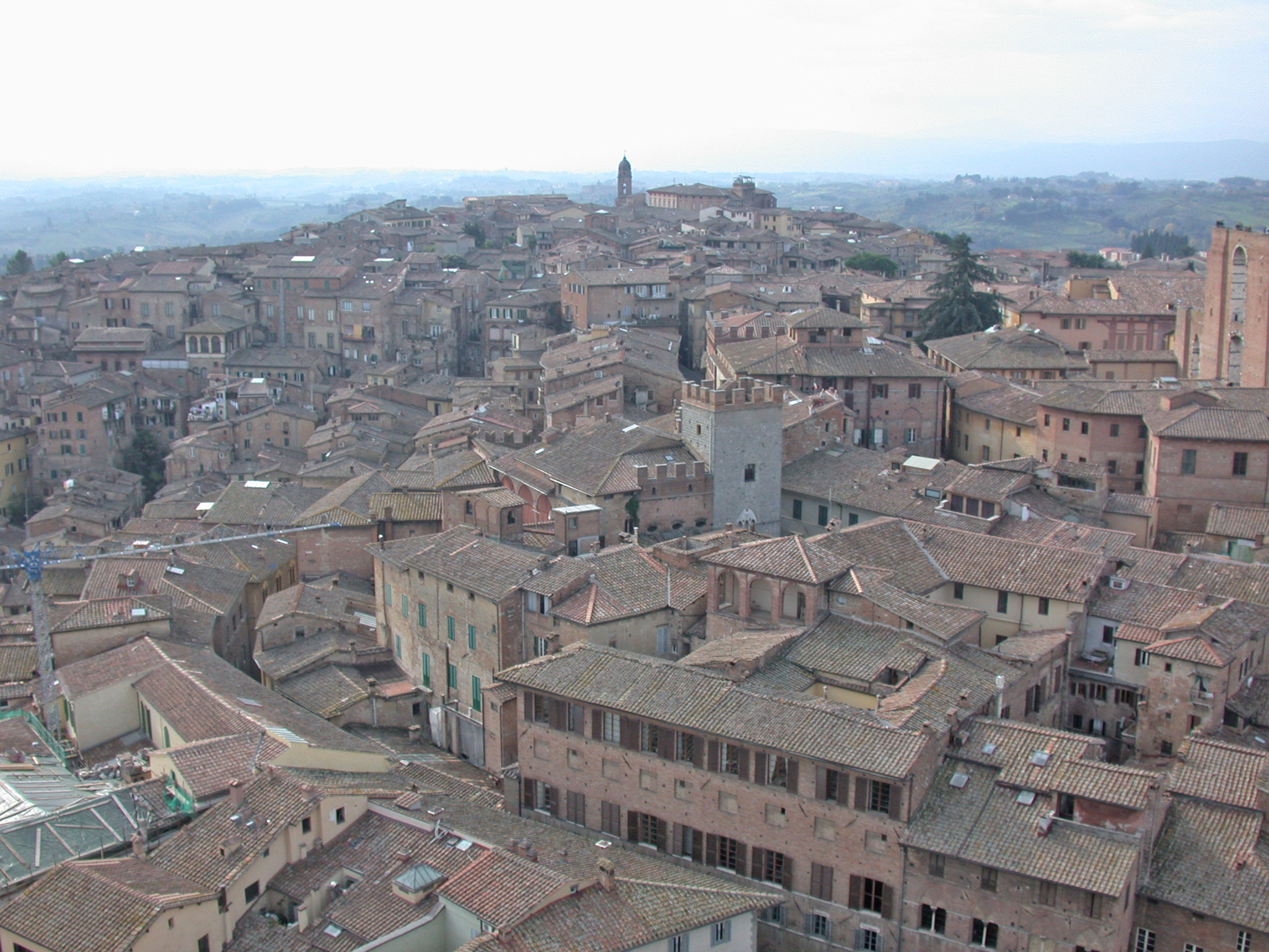 Italia, Siena, panorama della città dalla Torre del Mangia